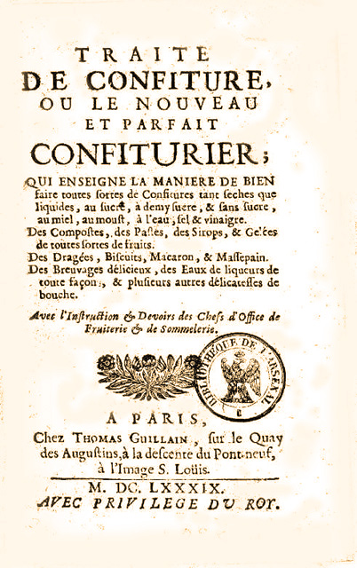 Traité de confiture ou le nouveau et parfait confiturier (1689) publié à Paris, chez Thomas Guillain, sur le Quay des Augustins, à la descente du Pont-neuf, à l'Image S. Loüis. M.DC.LXXXIX. Avec Privilège du Roy.